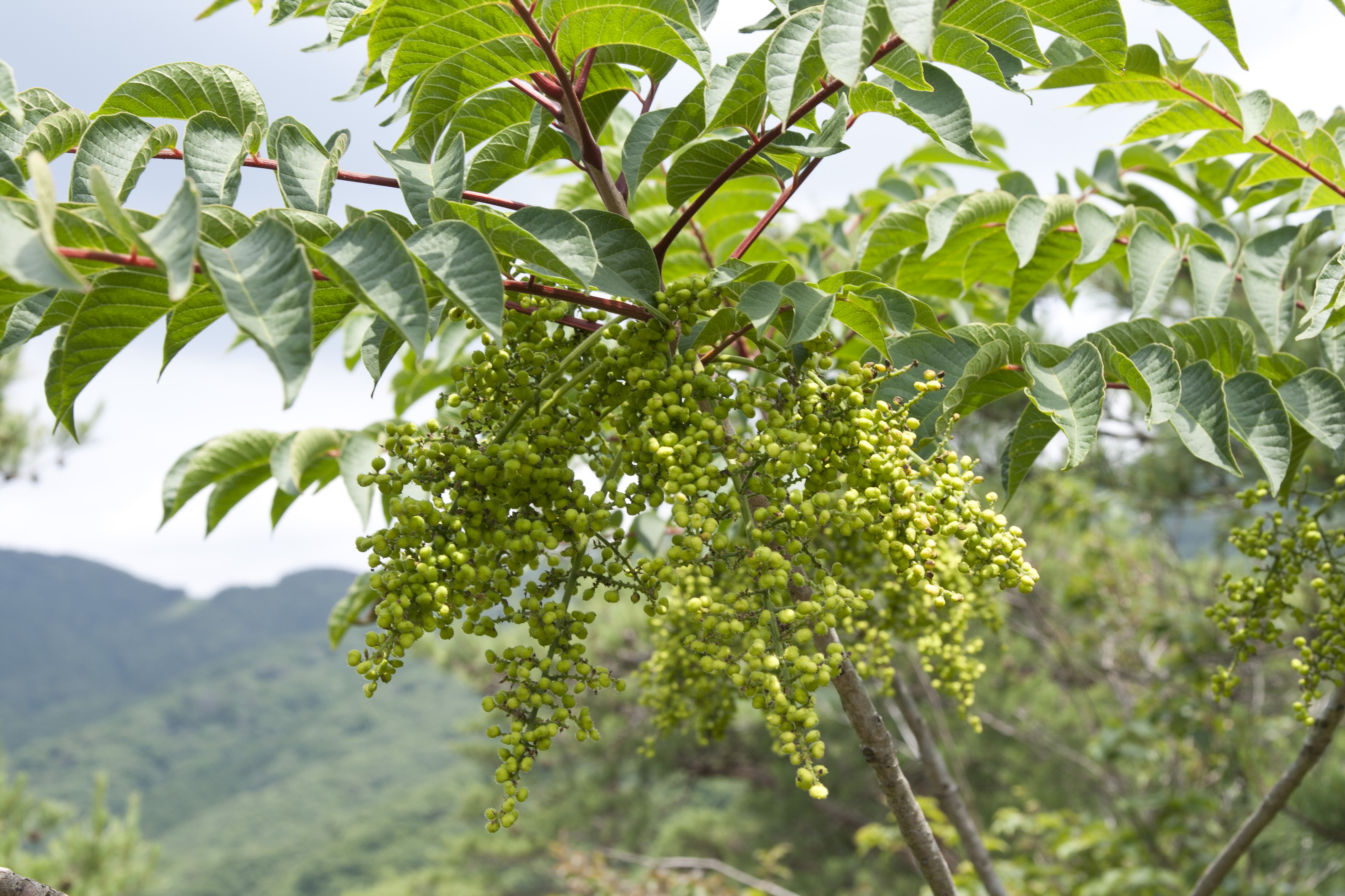 ヤマウルシ (学名:Toxicodendron trichocarpum) 撮影地：茨城県桜川市